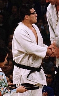 Judo, 1964 Olympics, Akio Kaminaga